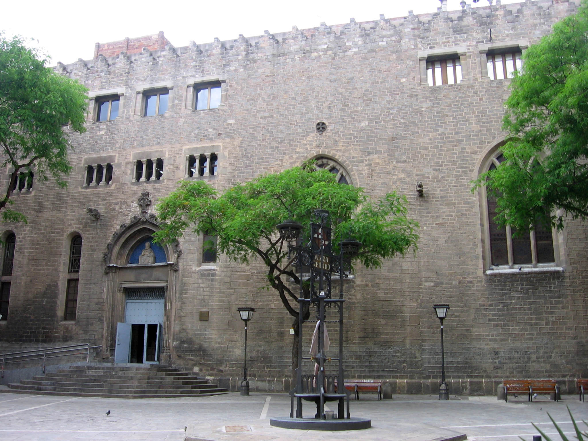 Monasterio de Sant Pere de les Puel·les.